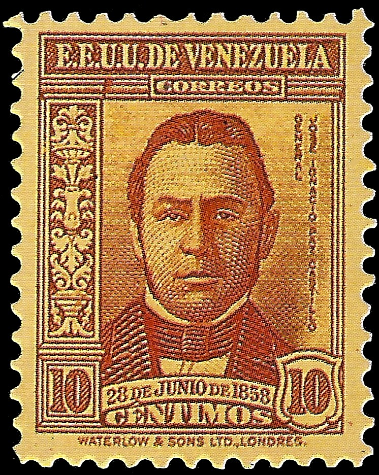 80 aniversario de la impresión de la primera estampilla postal venezolana año 1939. Impresa por Waterlow & Sons, Londres. Perforacion 12 1/2. Nº de catálogo * según Aurelio Blanco:338 Blanco, Aurelio. 2009: Venezuela Catálogo especializado de estampillas. Caracas. 183p. ISBN 980-300-176-0